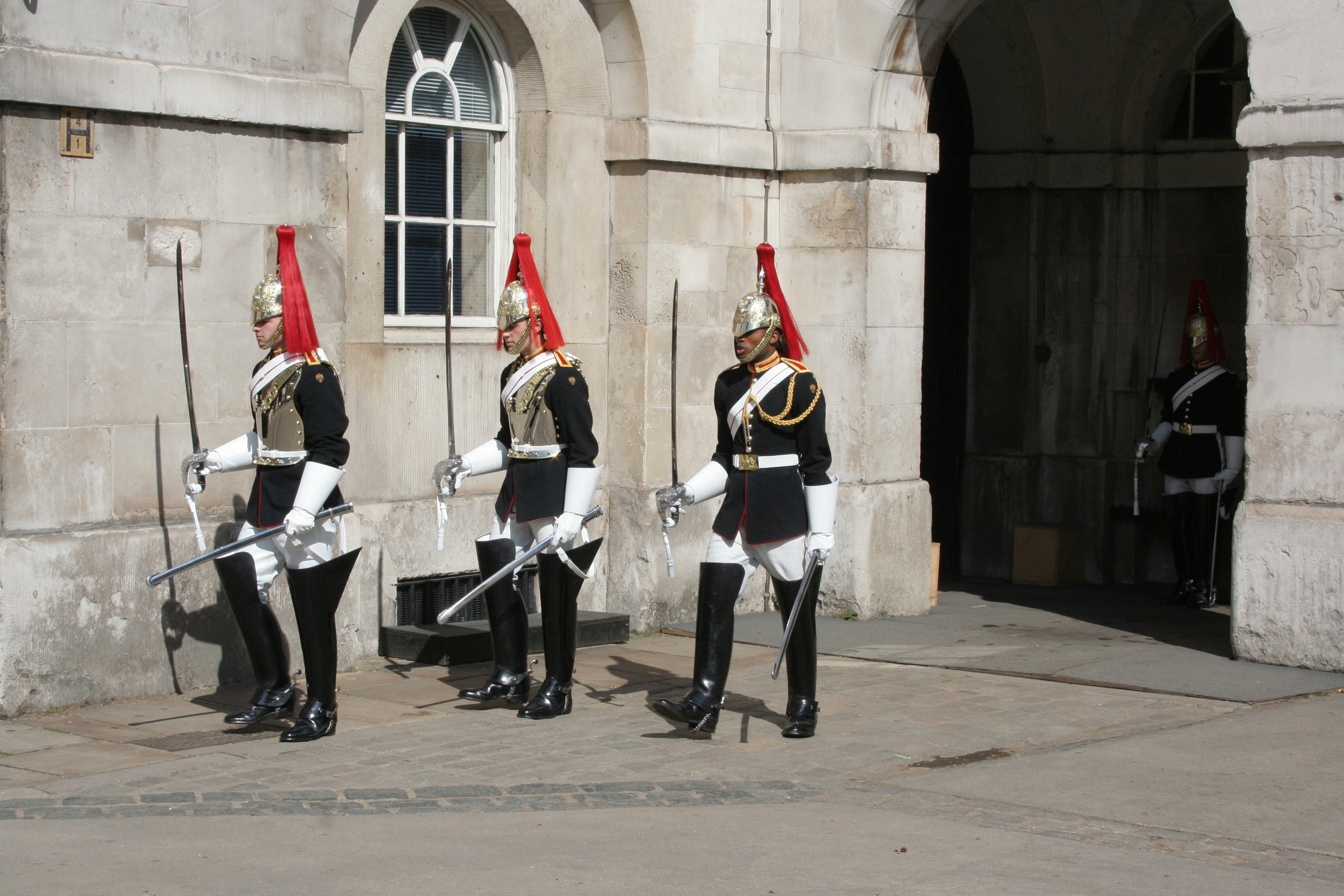 Relève des Horse Guards au bâtiment des Horse Guards